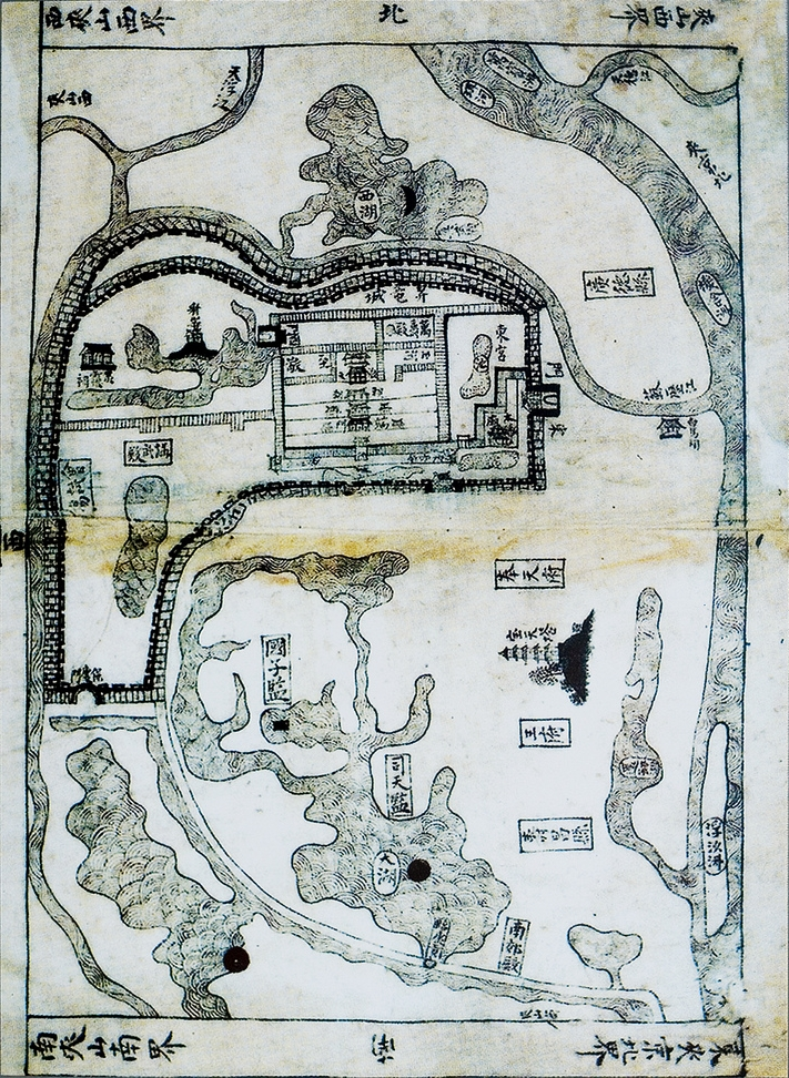 Bản đồ kinh thành Thăng Long theo Hồng Đức bản đồ sách (洪德版圖冊), ban hành vào đời vua Lê Thánh Tông, năm Hồng Đức thứ 21 (tức năm 1490).